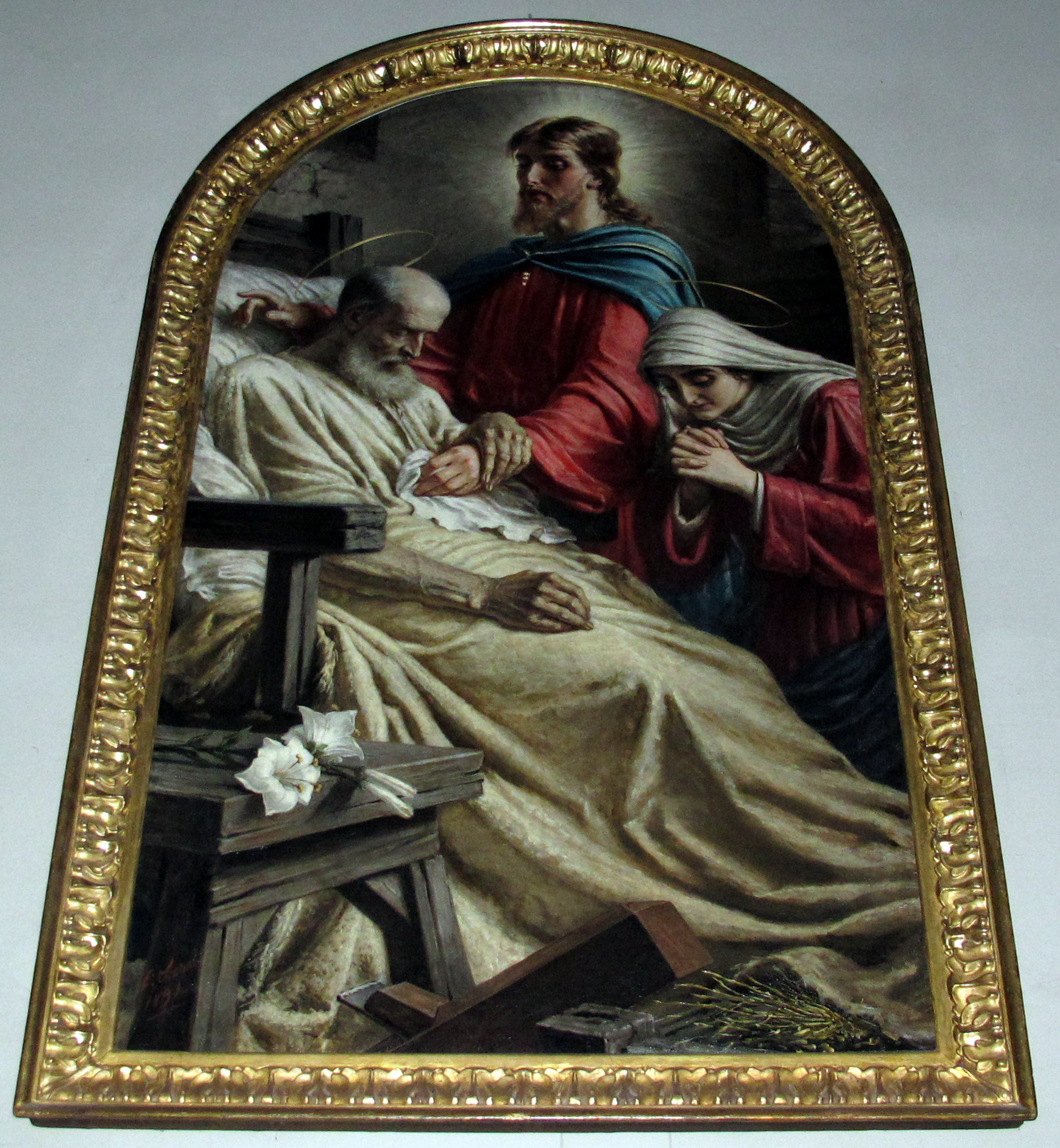 Santa Maria, Figline Valdarno